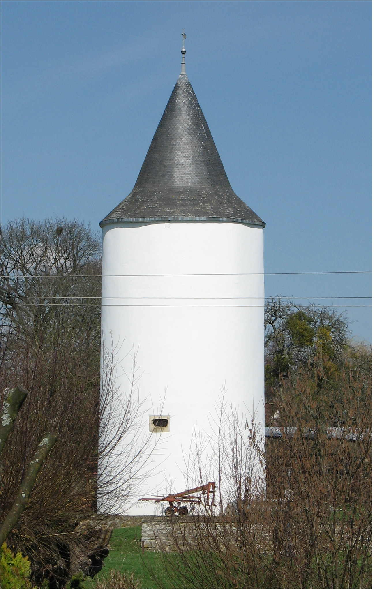 Den Tuerm vum "Schlass" zu Weiler zum Tuerm